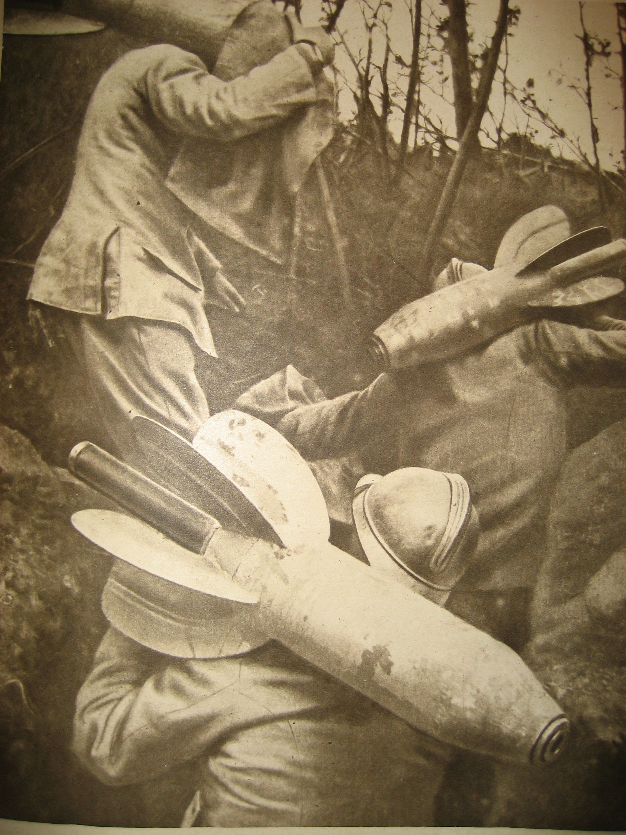 Photographie tirée de l'hebdomadaire "Le Miroir". 1916. Transport d'obus de crapouillot dans une tranchée. 1916